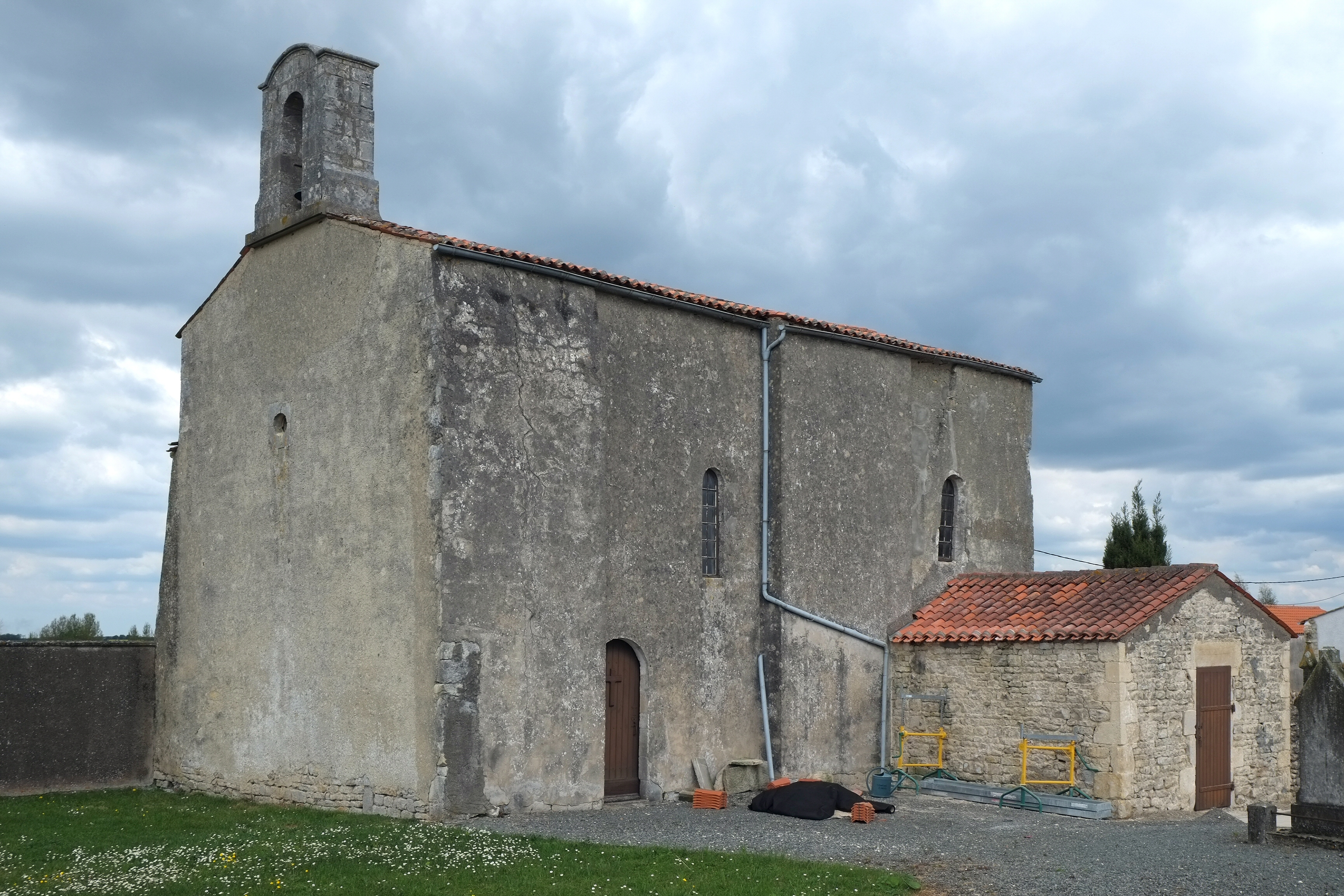 Église Saint-Pierre Anais Charente-Maritime France